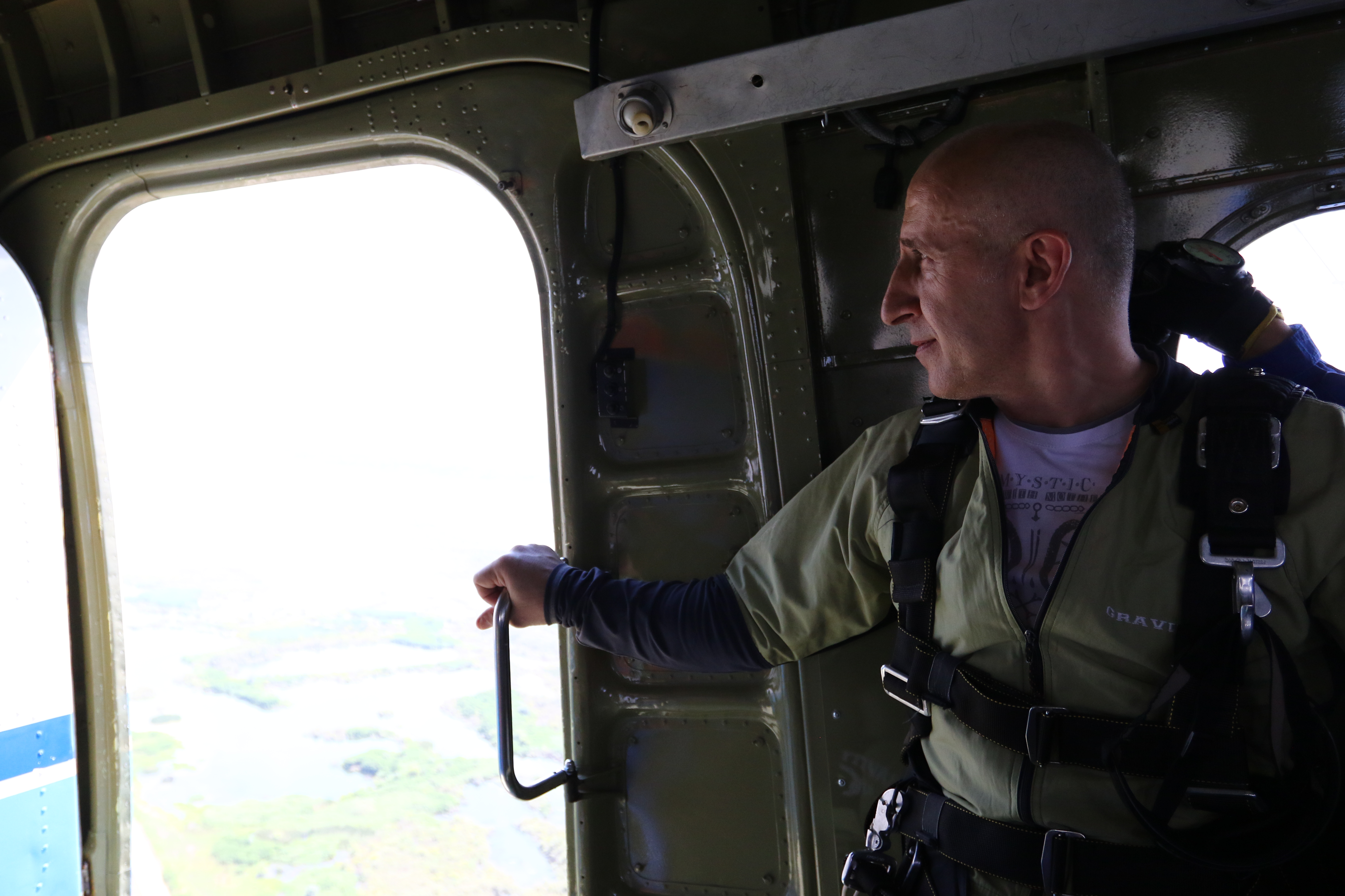 la 3500 m, în AN 2, cu 30 de secunde înainte de salt